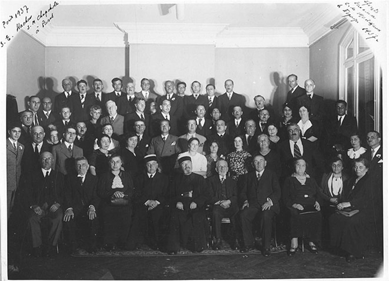 J.E. Hadży Seraja M. Szapszał w gościnie u paryskich Karaimów w 1937 r.